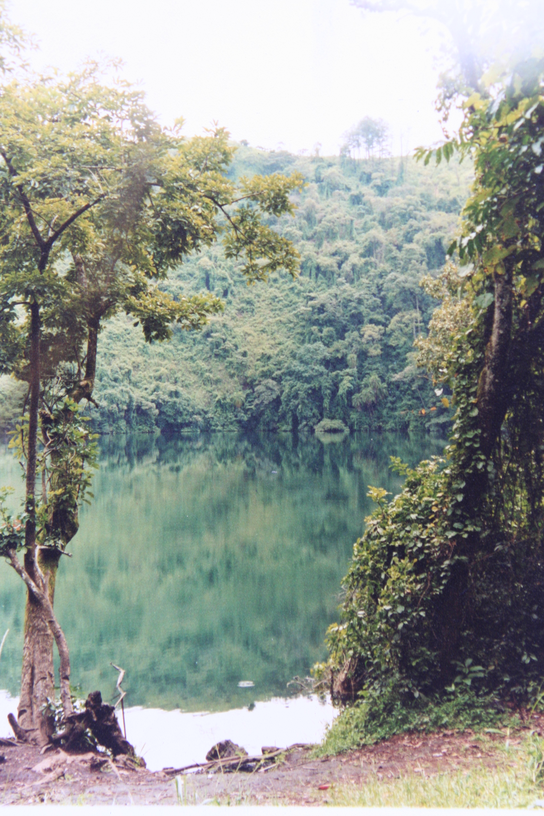 Lac Baleng, Magnifique espace de tourisme situé dans la région de l'Ouest ou l'on peu au delà de l'eau qui épouse le visage de la nature environnante, se laisser bercé par de champ des oiseaux.